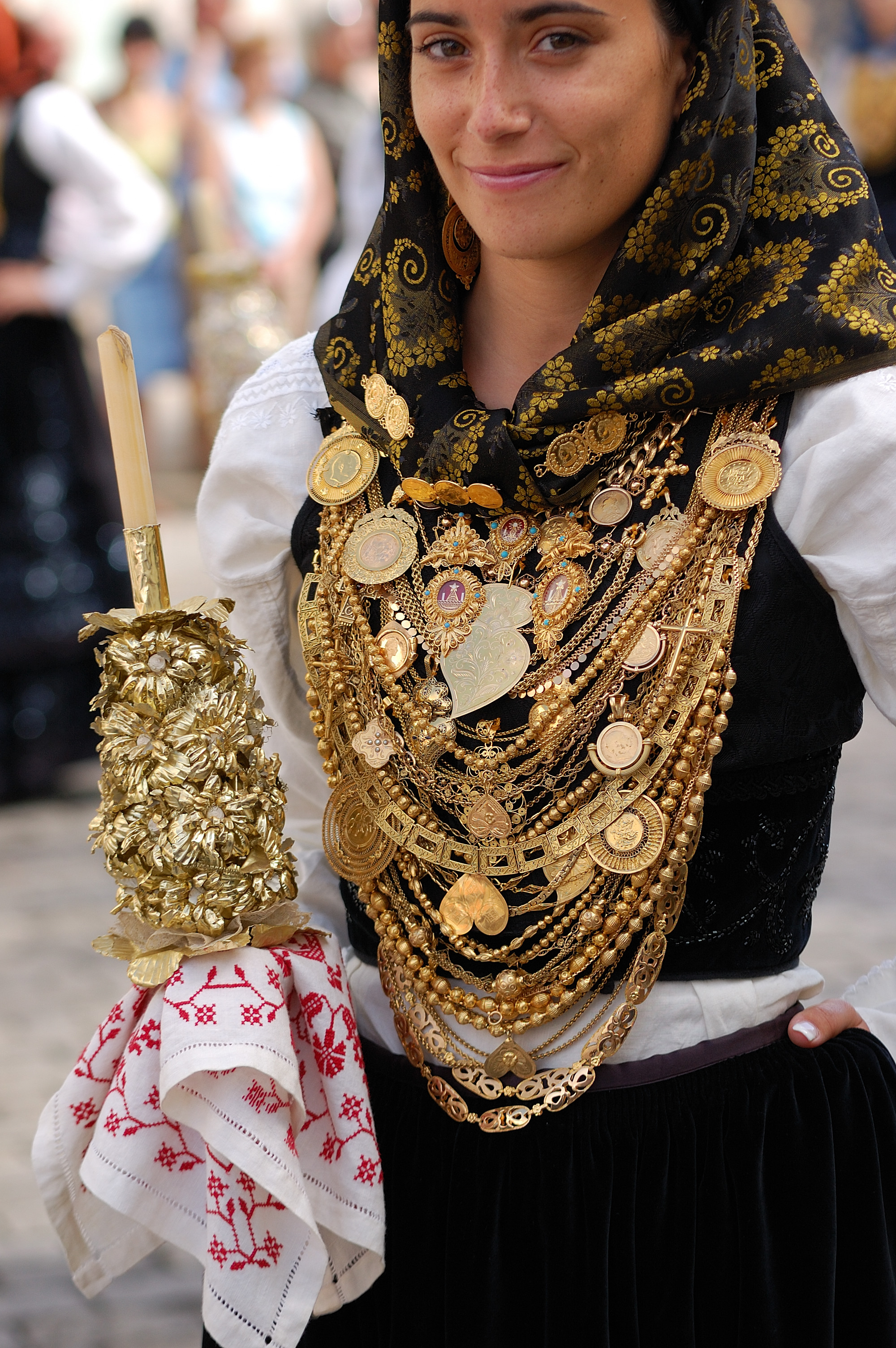 Viana do Castelo, Portugal [2010]